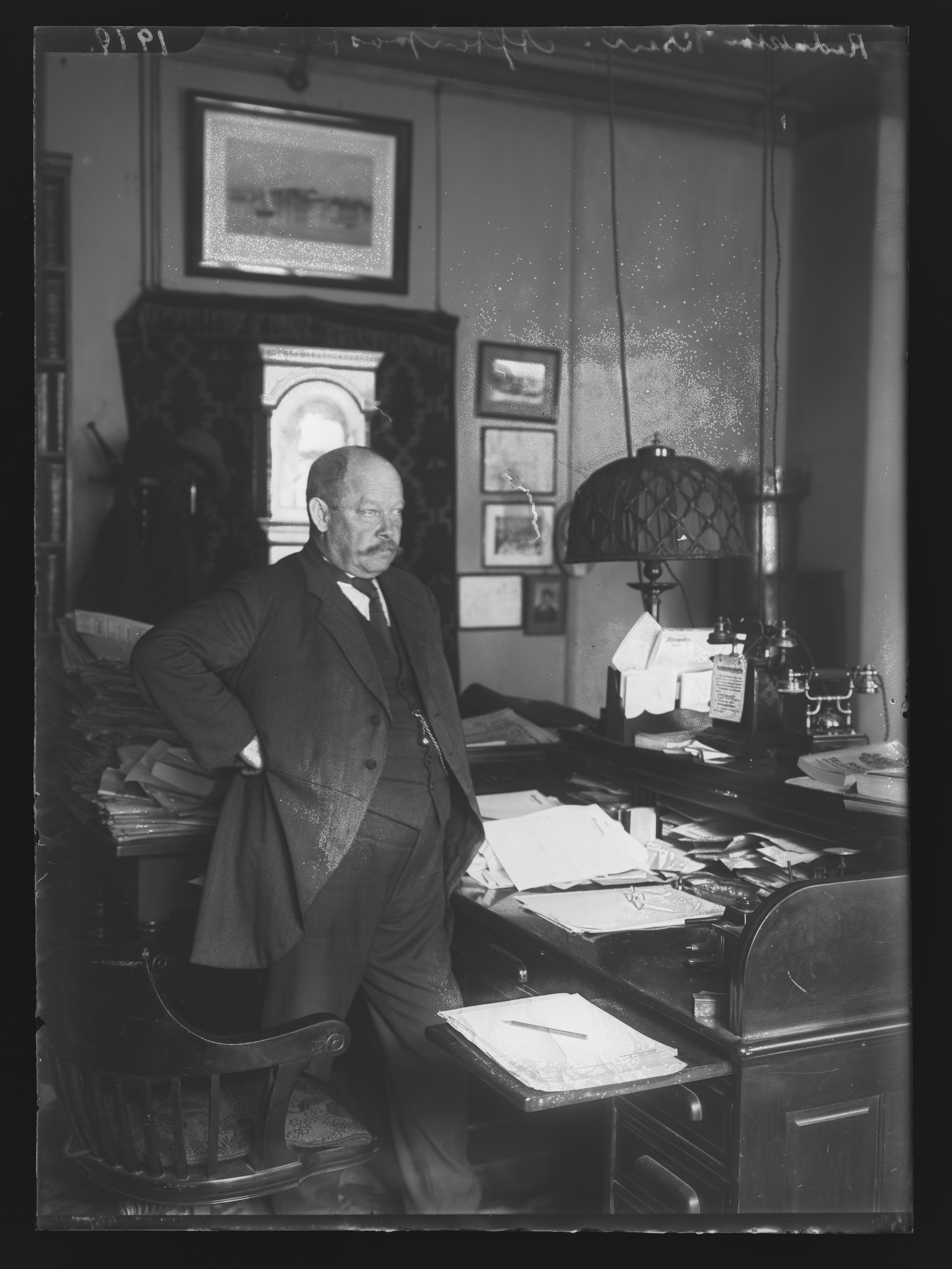 Bildet er hentet fra Nasjonalbibliotekets bildesamling. Anmerkninger til bildet var: Påskrift arkivark: Redaktør Diesen Arkivnummer: 337 Oslo, Oslo Depicted person: Diesen, Thorstein